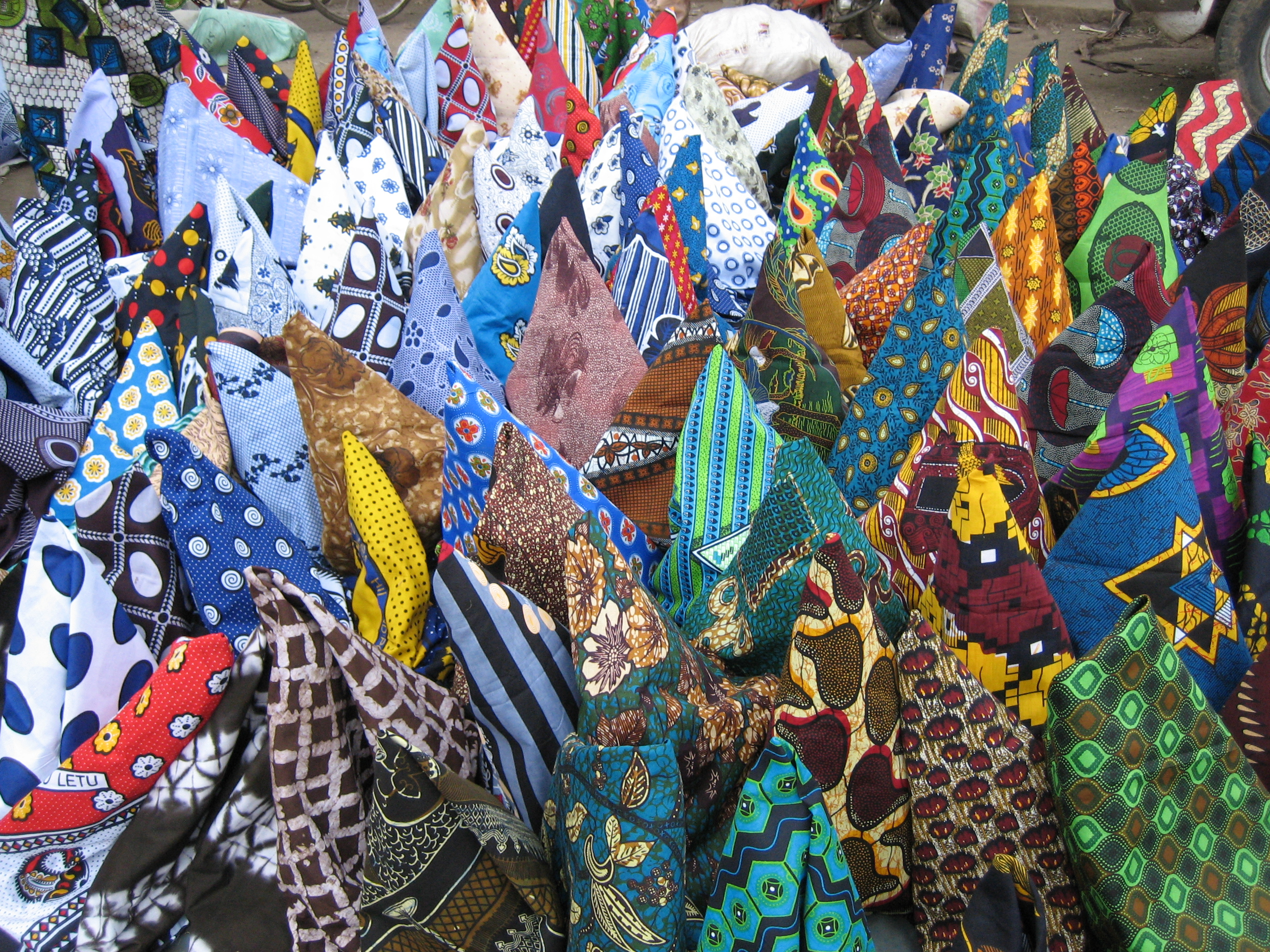 Kanga (or "khanga") and kitenge in Tengeru market near Arusha, Tanzania